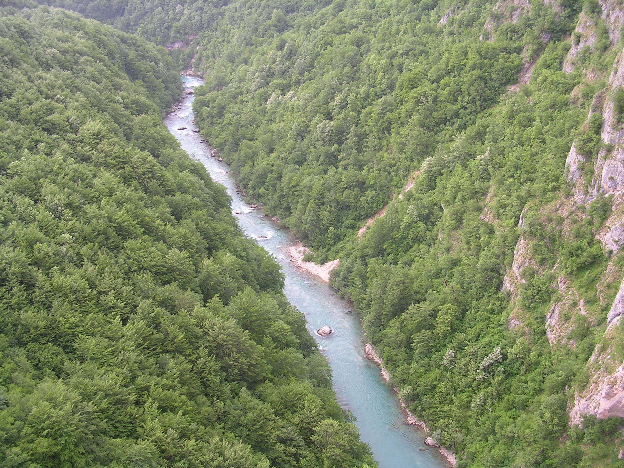 Kanjon Tare